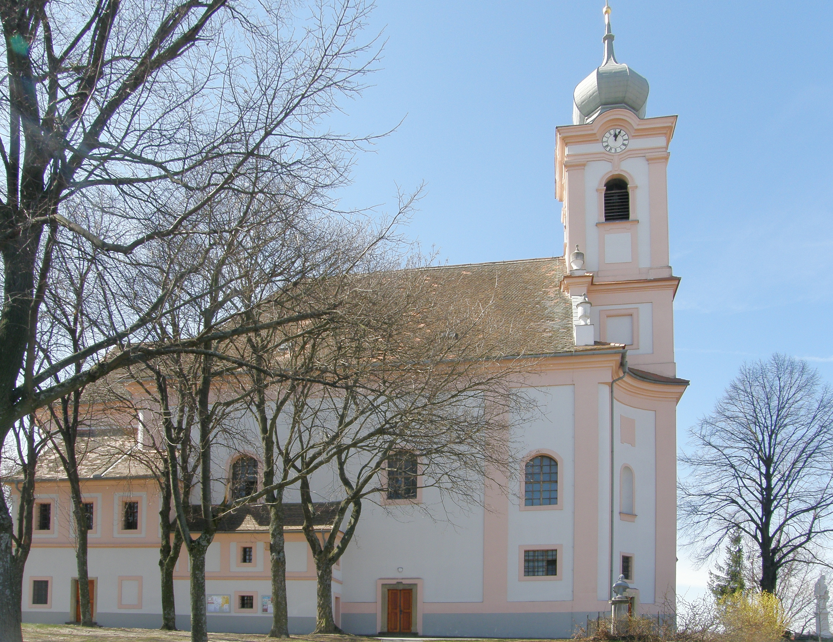 Kath. Pfarrkirche hl. Sebastian